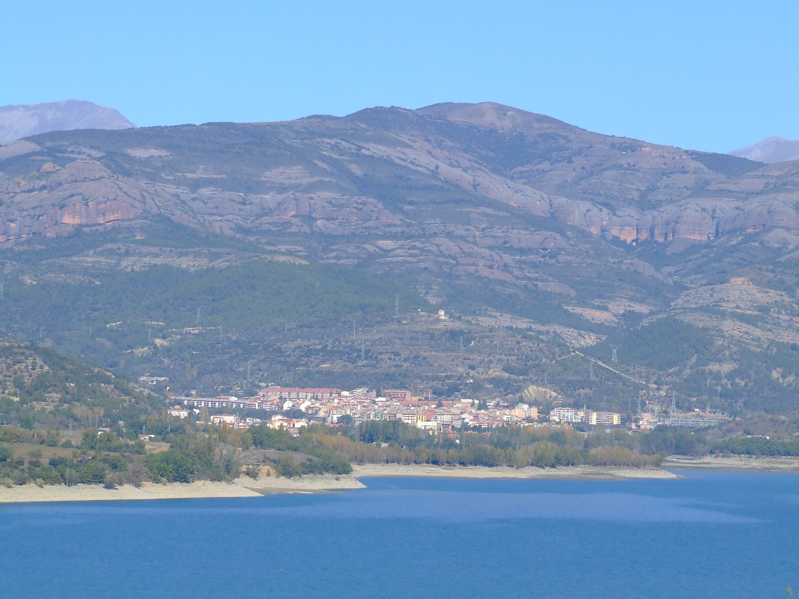 Vista general de la Pobla de Segur i el pantà de Sant Antoni des d'Aramunt (Pallars Jussà)